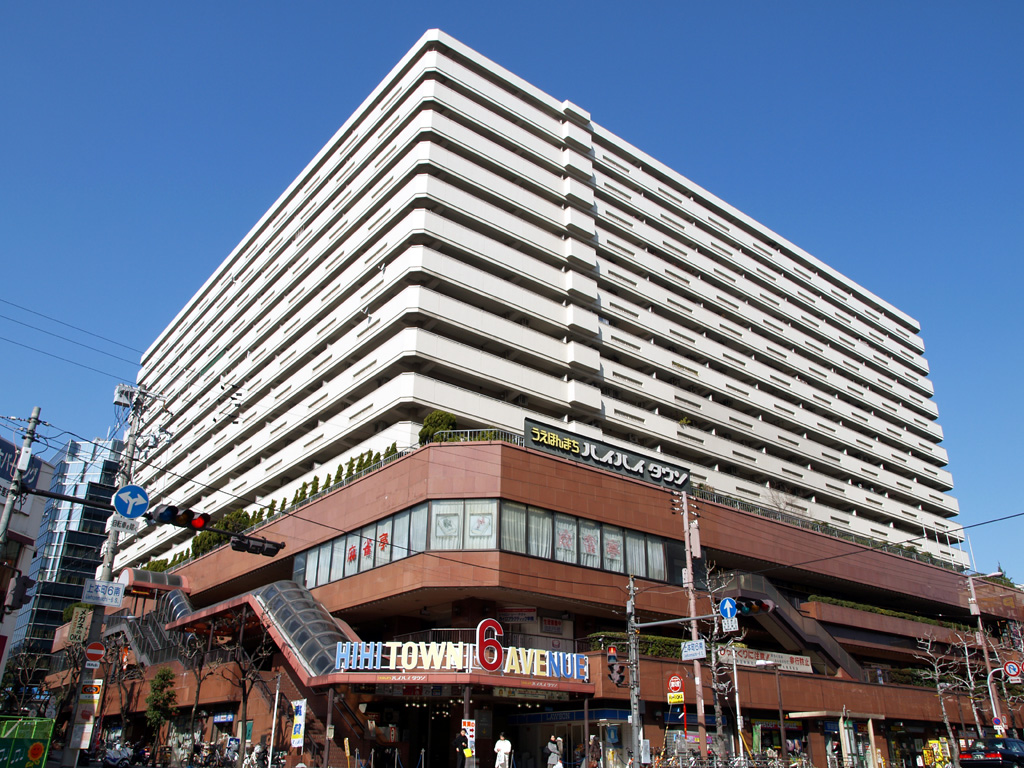 うえほんまちハイハイタウン所在地：大阪府大阪市天王寺区上本町6-3-31